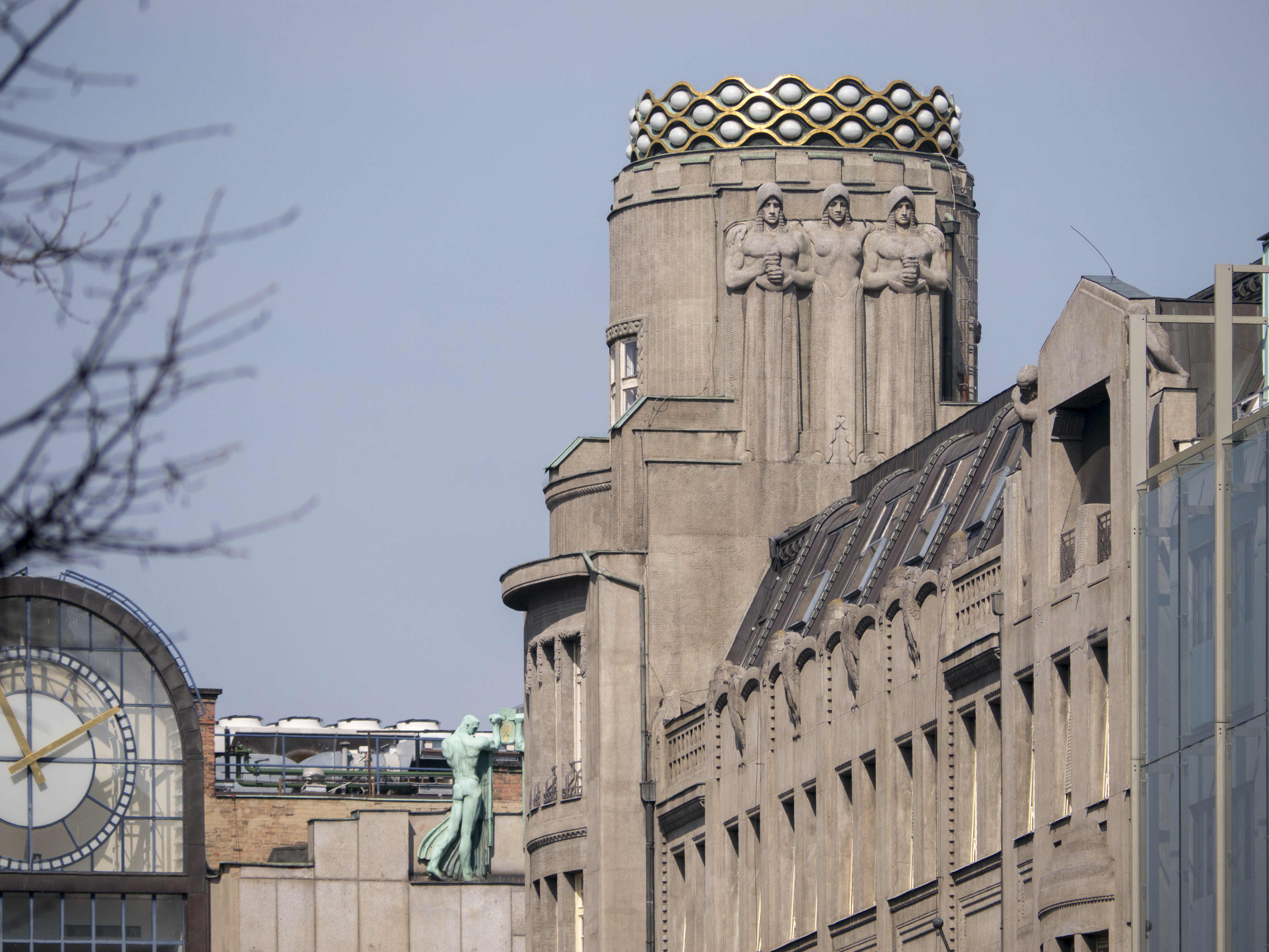 Prag Koruna Palast